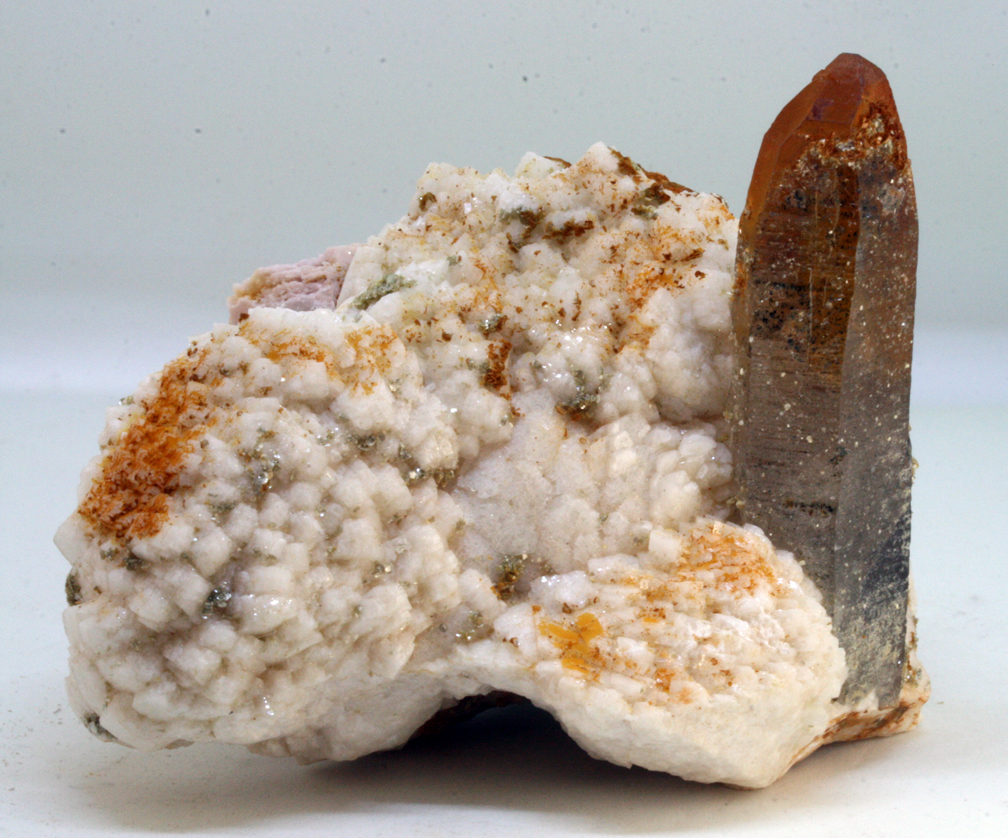 Cristal de cuarzo sobre un grupo de cristales de albita. Canteras de granito de Porriño (Pontevedra), España